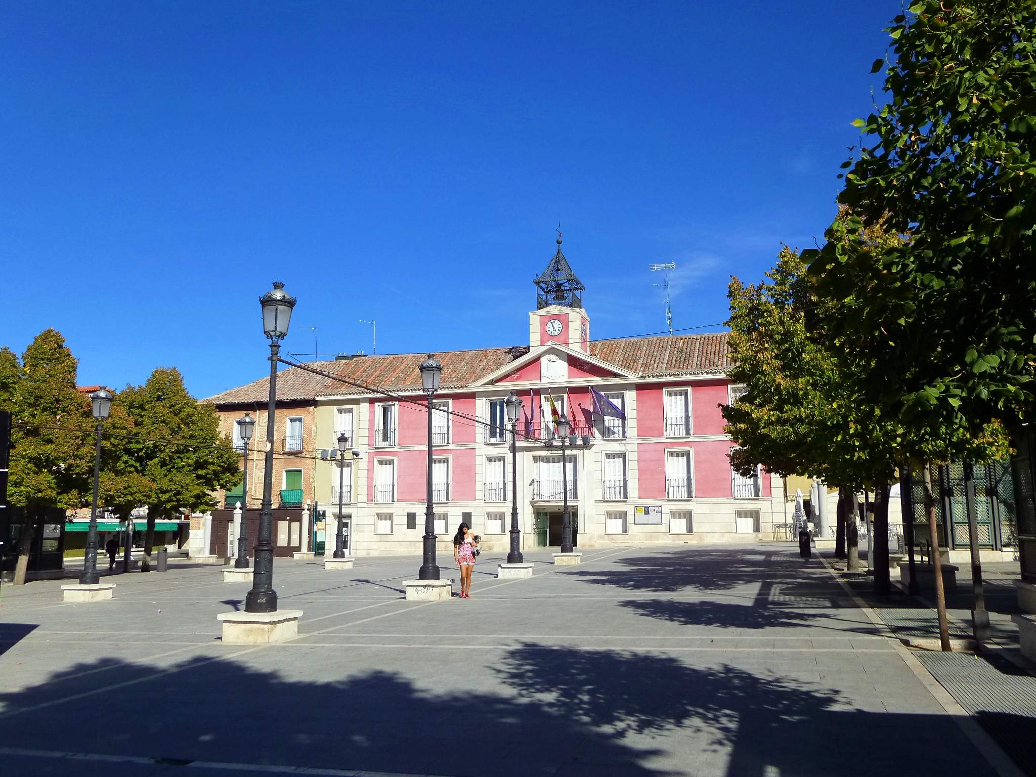 Plaza de la Constitución y Ayuntamiento, Aranjuez